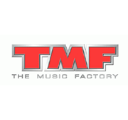 Logotipo dos extintos canais TMF no Reino Unido e Austrália